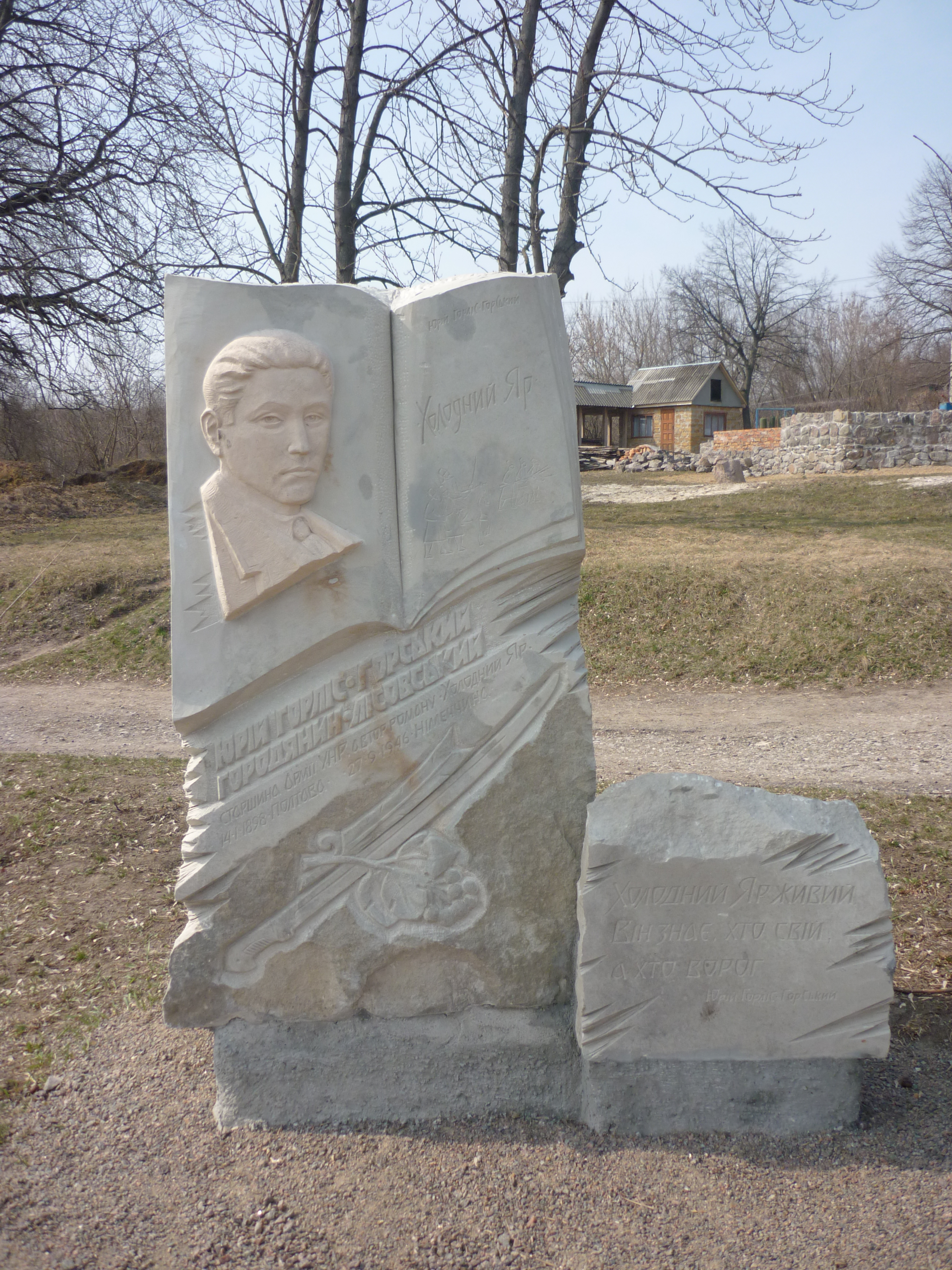 Пам'ятник героям Холодного Яру в селі Мельники Чигиринського району